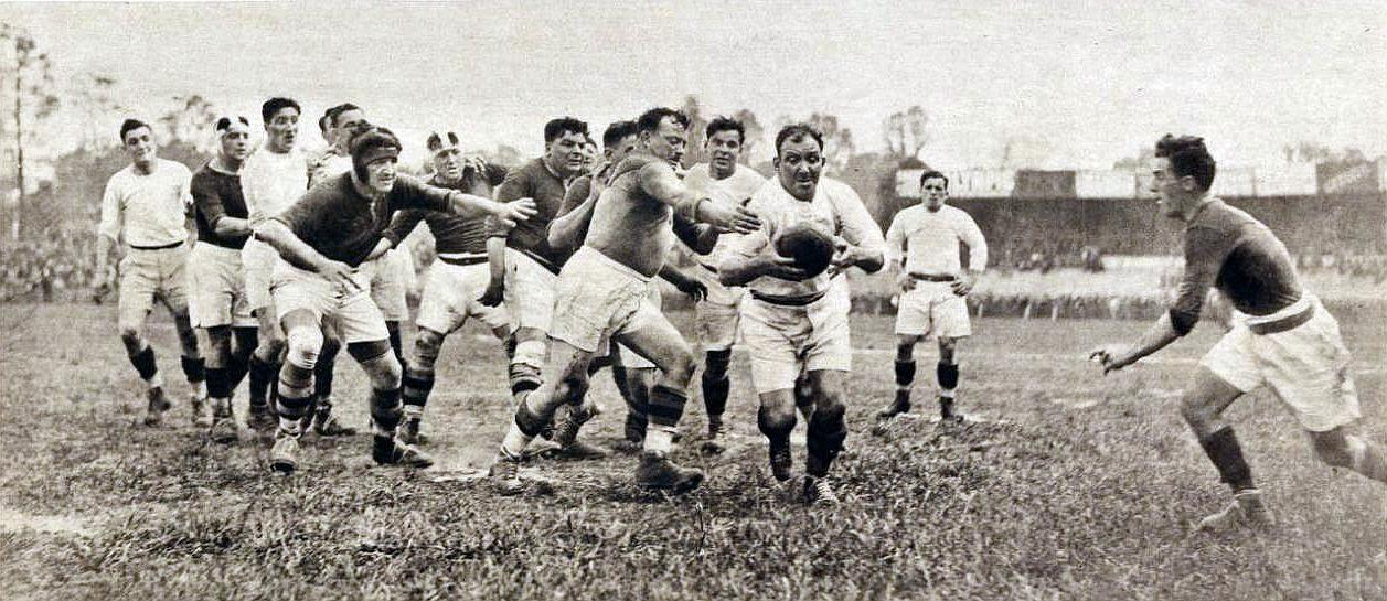 Toulon (foncé)-Lyon (clair) en finale du championnat de France de rugby 1931 - Lafontan tente d'intercepter Cartier.